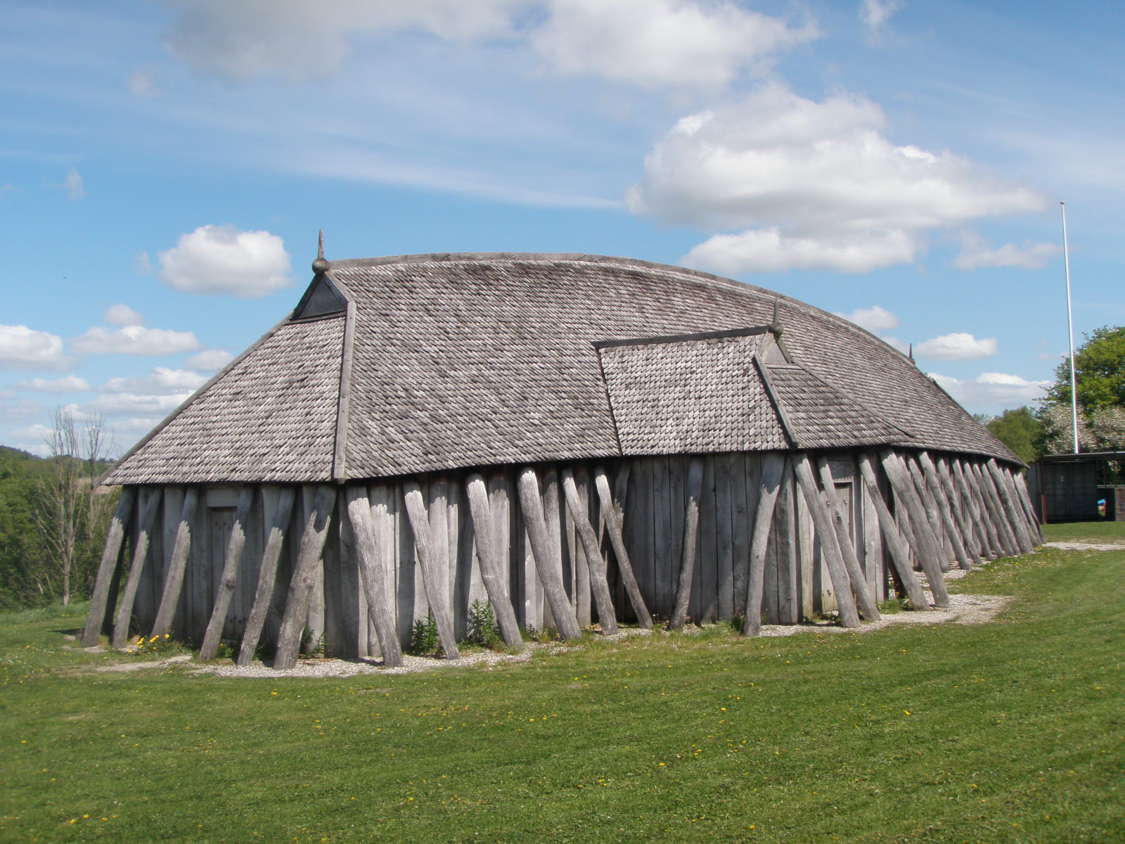 Vikingeborgen Fyrkat